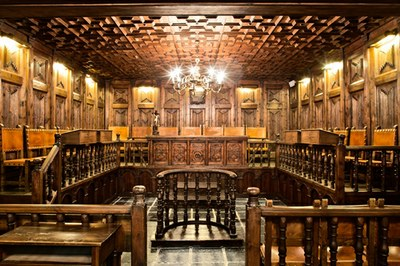 Interior del Tribunal de Corts d'Andorra